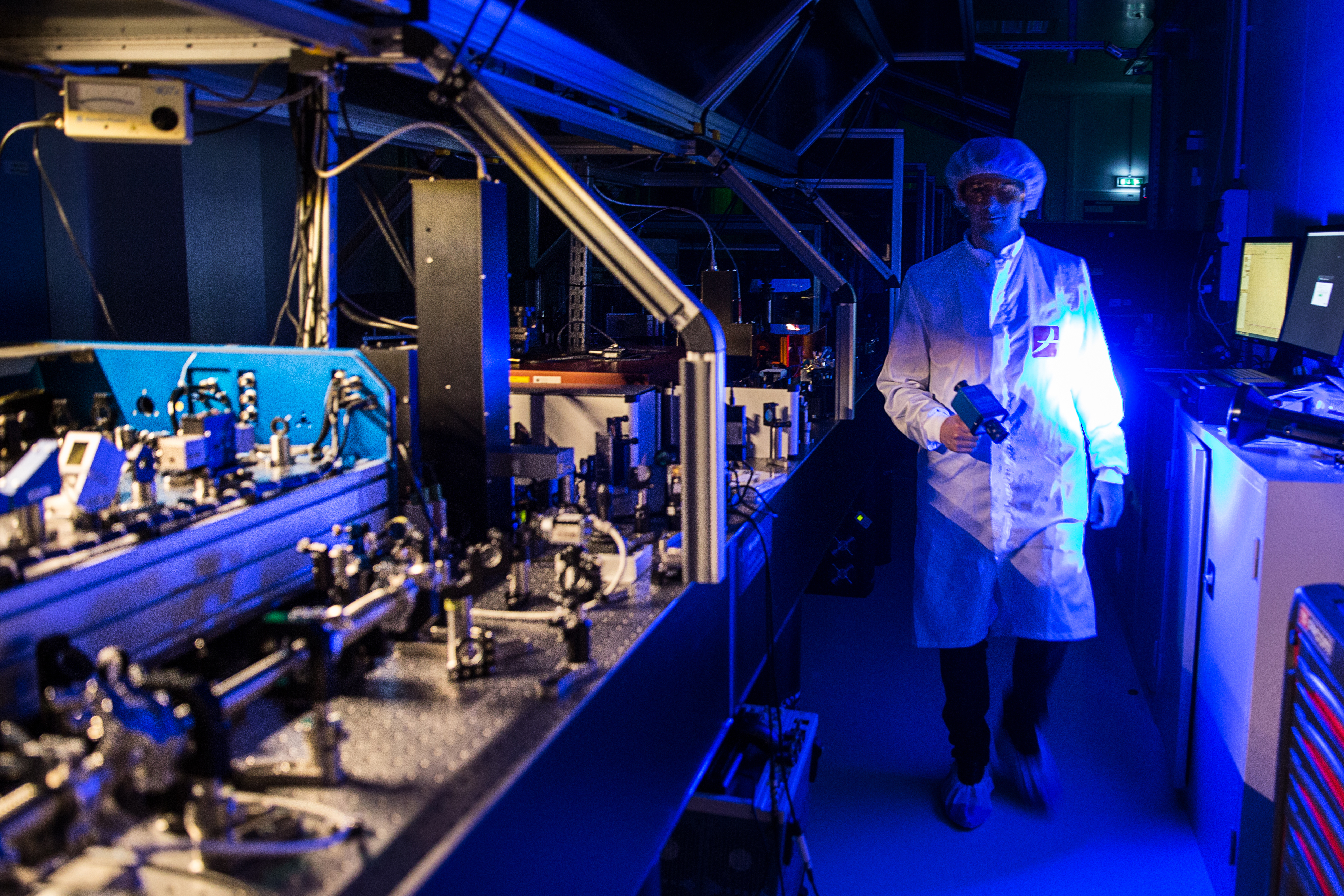 Gautier Lagarde Lasériste au projet Apollon Crédit photographique : © École polytechnique - J.Barande